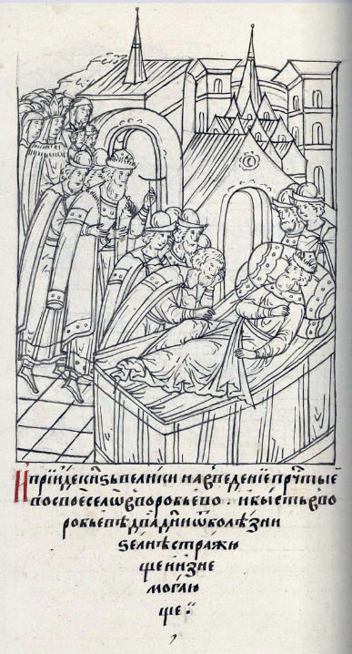 И пришёл великий князь (Василий III) в Введение Пречистой в своё село Воробьёво, и был в Воробьёве два дня, от болезни очень страдая и изнемогая.